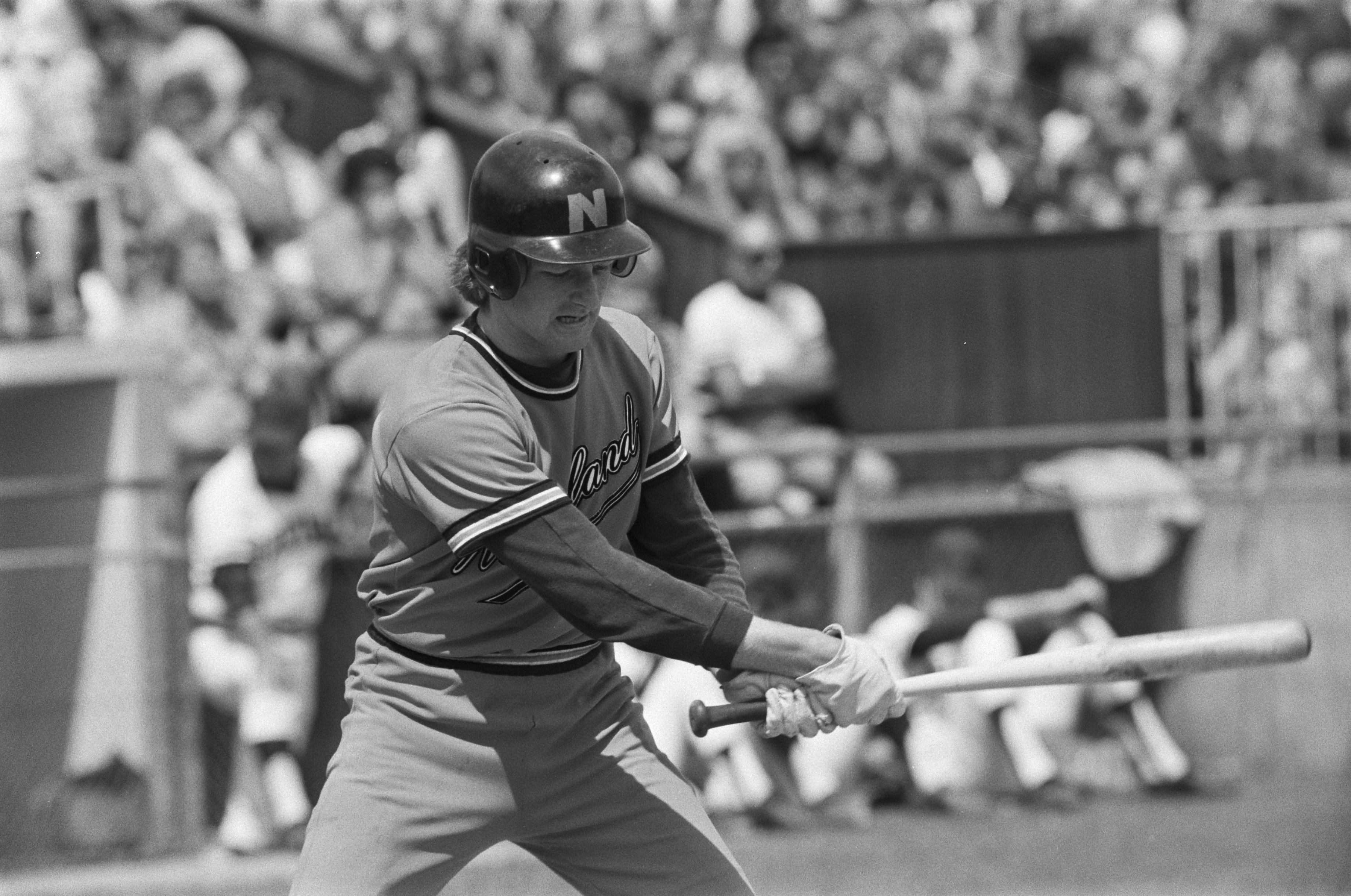 Collectie / Archief : Fotocollectie Anefo Reportage / Serie : [ onbekend ] Beschrijving : Haarlemse honkbalweek, Nederland tegen Arizona 4-8, Wim Hageman aan slag Datum : 21 juli 1974 Locatie : Haarlem Trefwoorden : honkbal, sport Persoonsnaam : Hageman, Wim Fotograaf : Mieremet, Rob / Anefo, [onbekend] Auteursrechthebbende : Nationaal Archief Materiaalsoort : Negatief (zwart/wit) Nummer archiefinventaris : bekijk toegang 2.24.01.05 Bestanddeelnummer : 927-3396